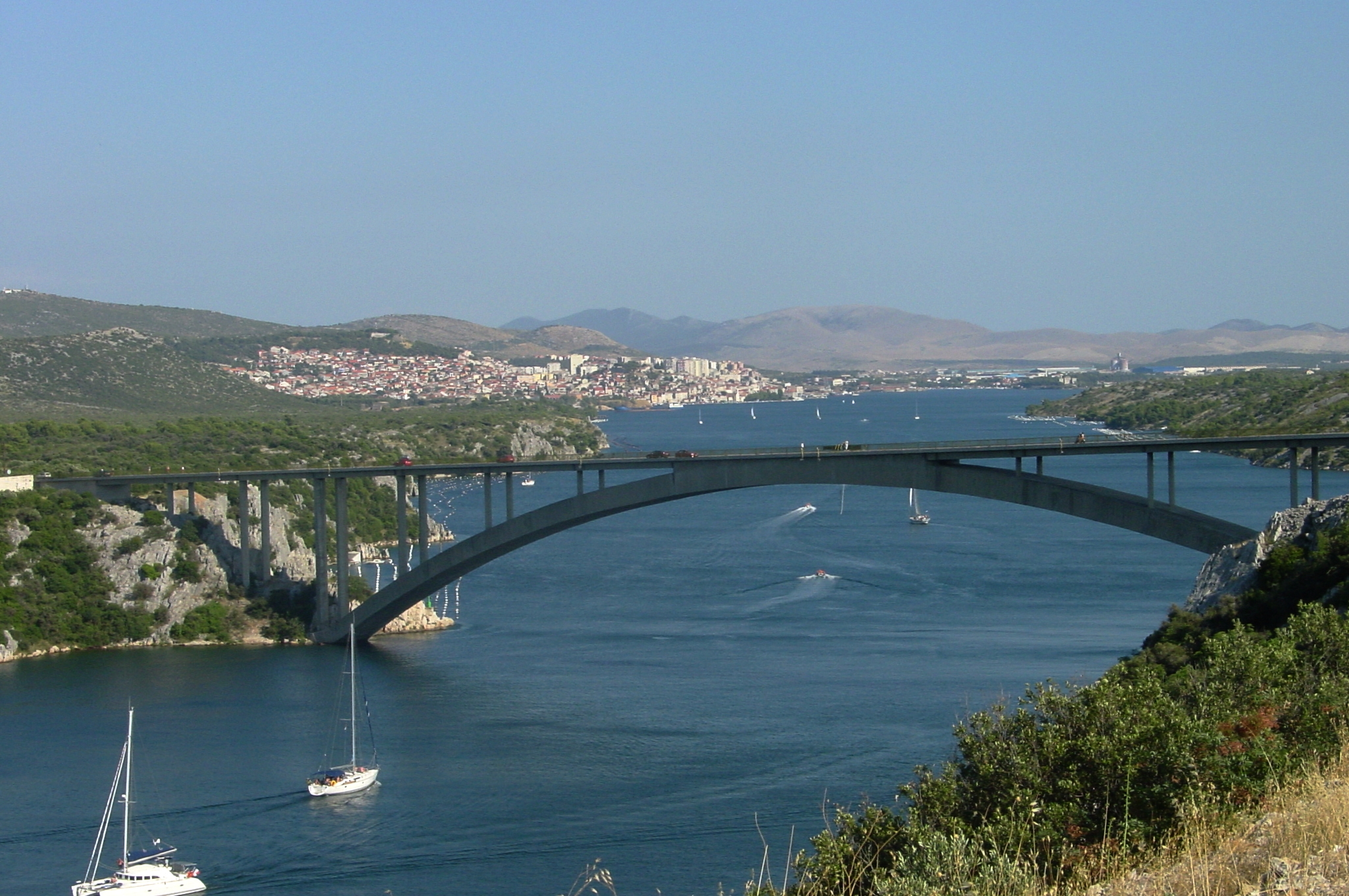 Ville de Šibenik vue depuis les bord de la rivière Krka. Comitat de Šibenik-Knin, Republika Hrvatska (Croatie)